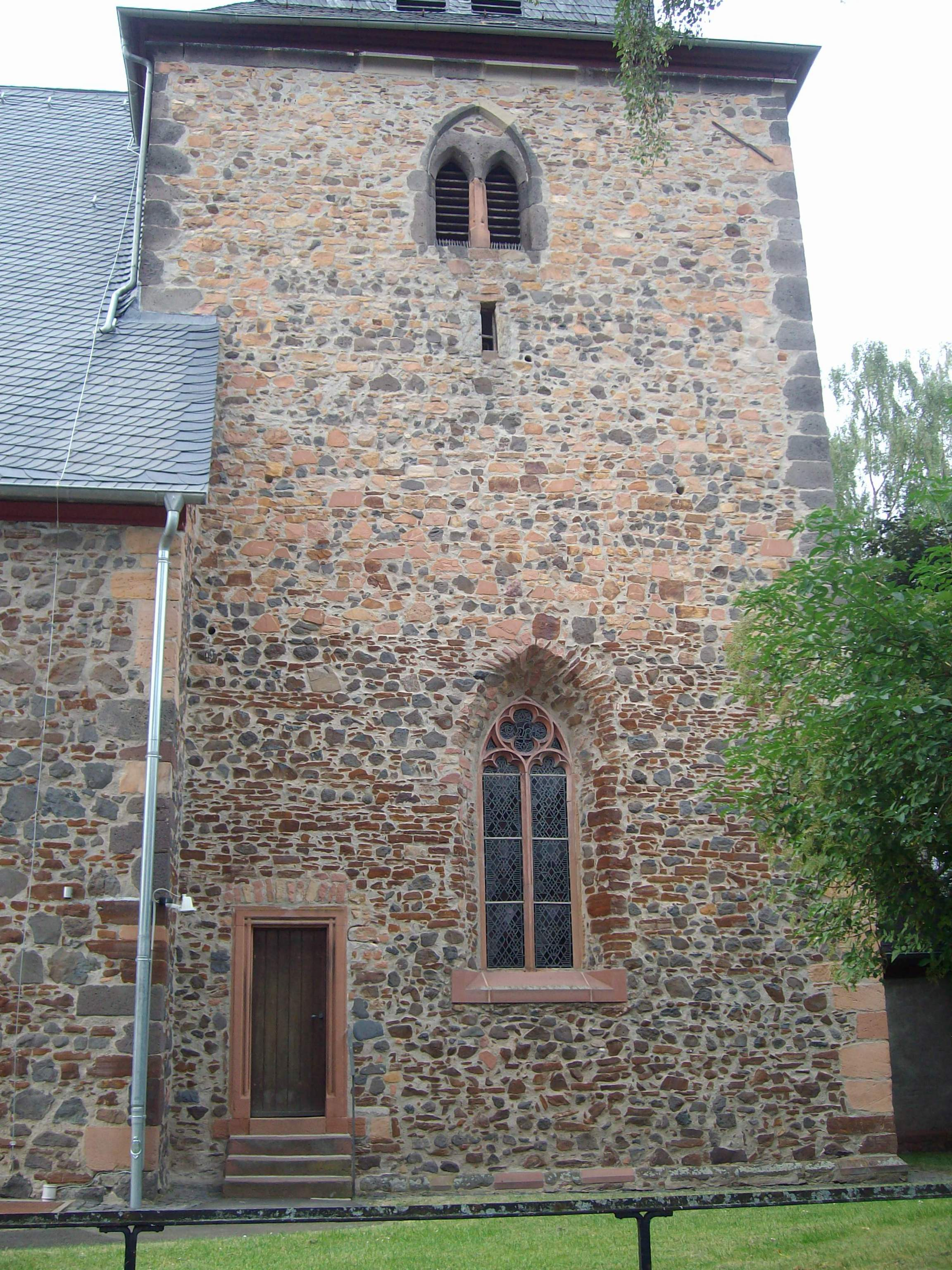 Südseite des Kirchturms in Gießen-Wieseck, Hessen